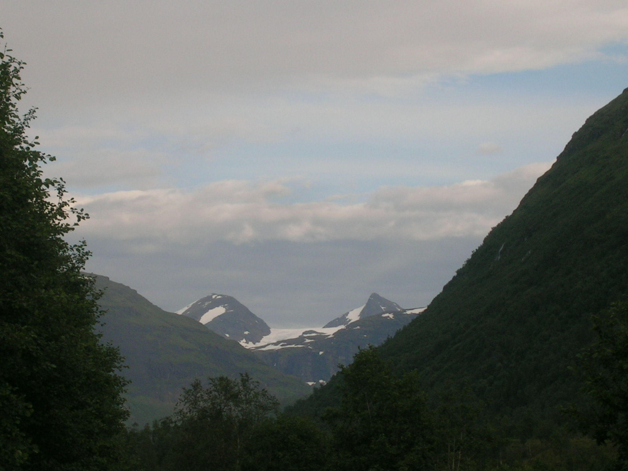 Okstindan, Nordland, Norway